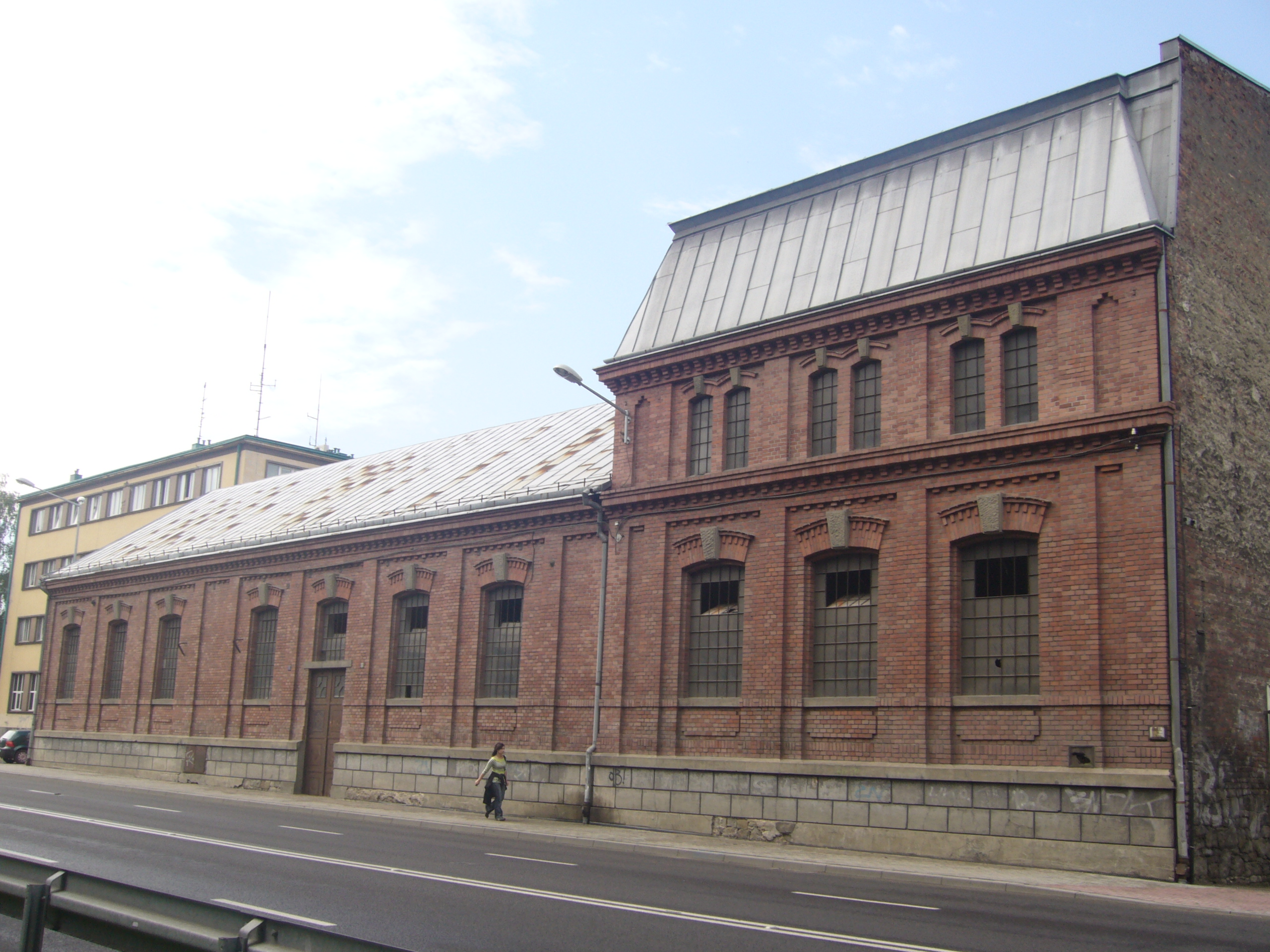 Budynek dawnej elektrowni w Bielsku-Białej